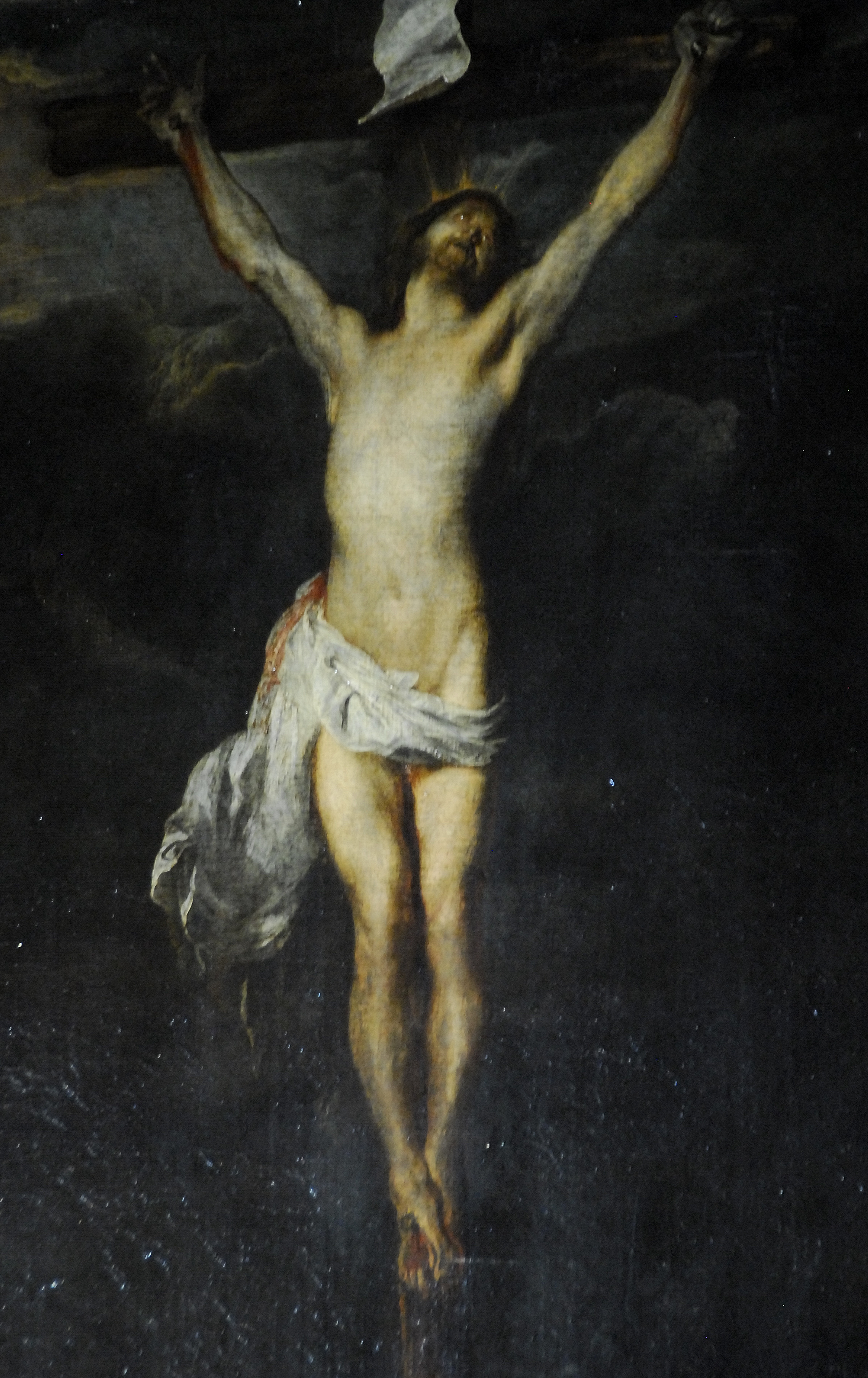 Palermo, ITA